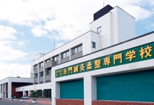 赤門鍼灸柔整専門学校